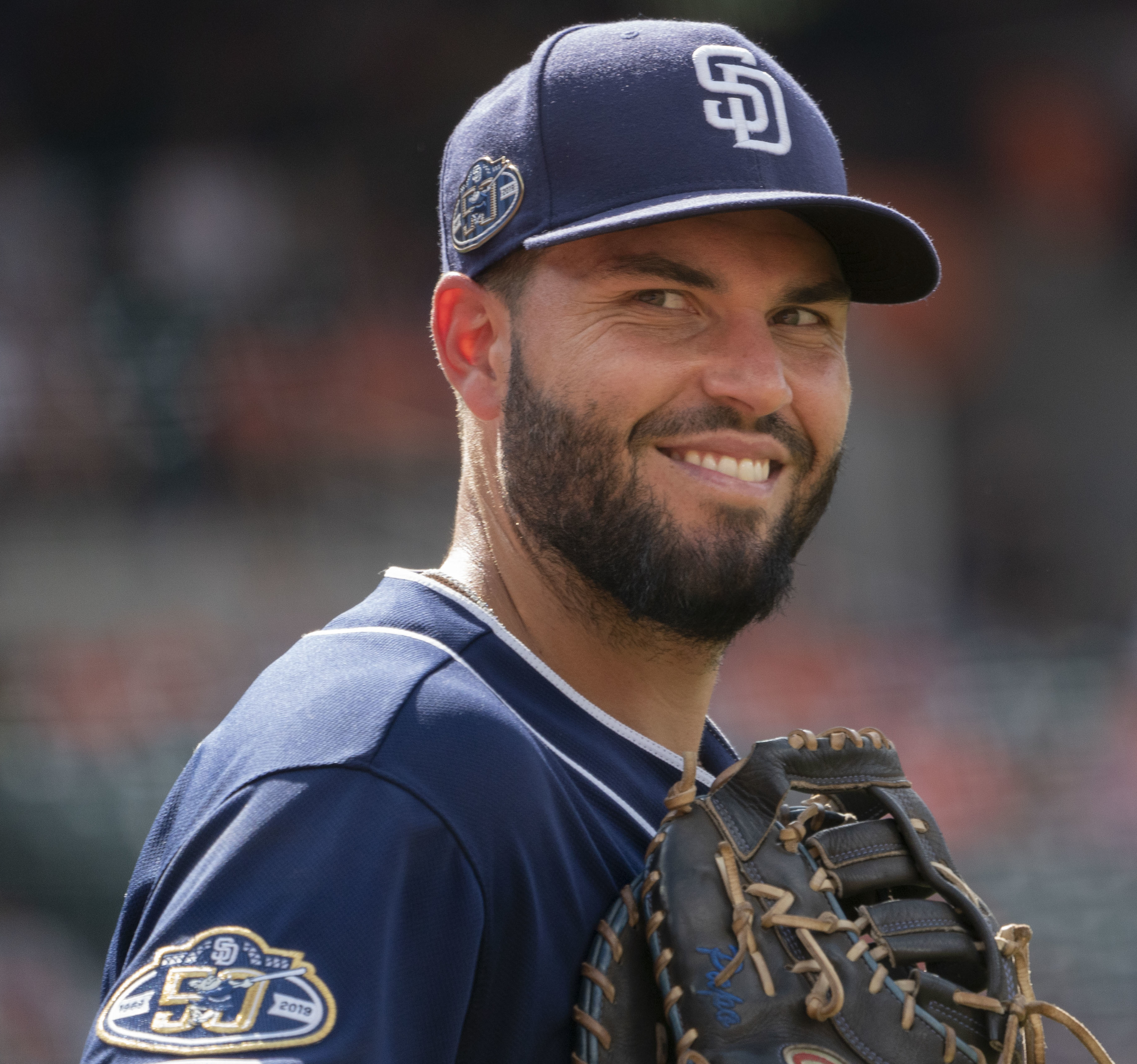 Padres at Orioles 6/26/19